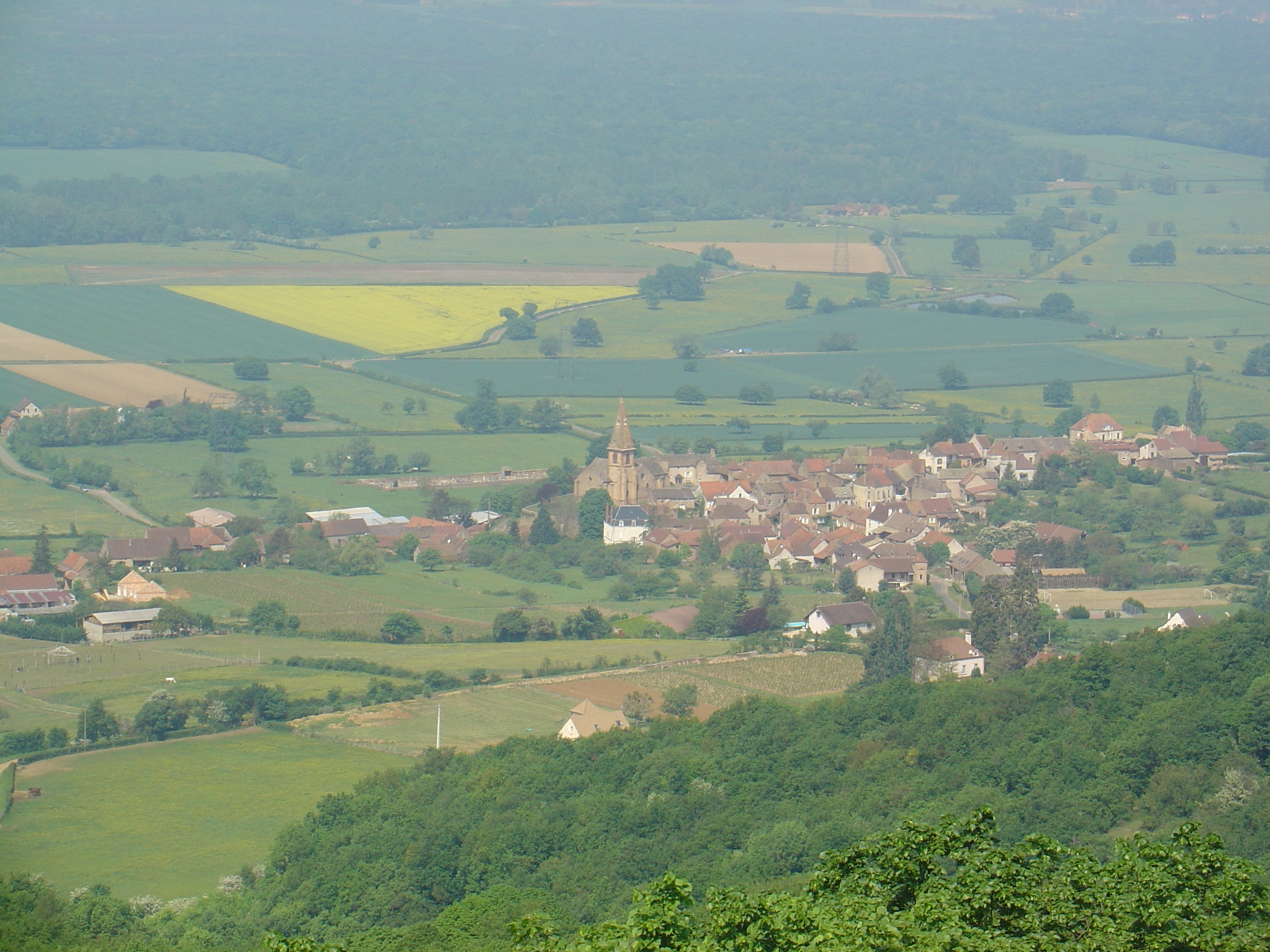 Etrigny (71- France). Le village vu depuis la roche d'Aujoux